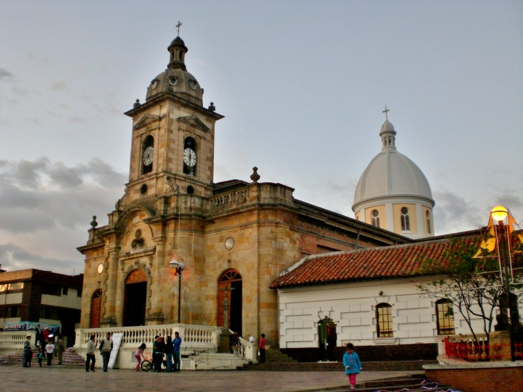 Templo parroquial san miguel arcángel